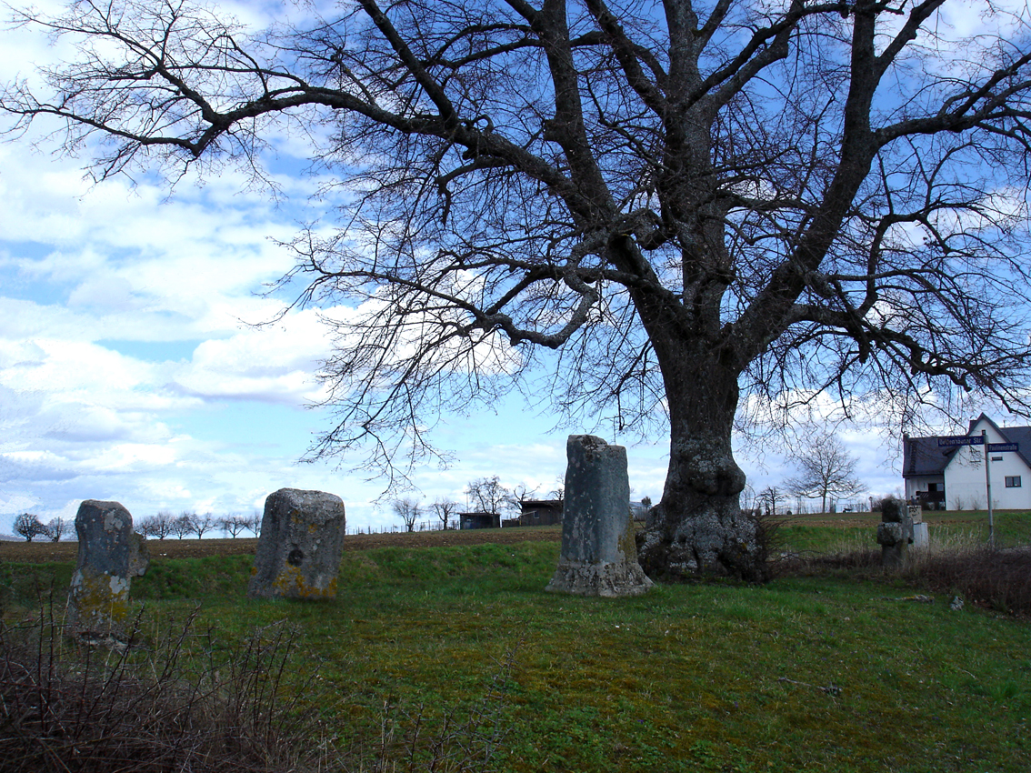 Gerichtsplatz Unter den Linden mit Sühnekreuzen, Weil im Schönbuch